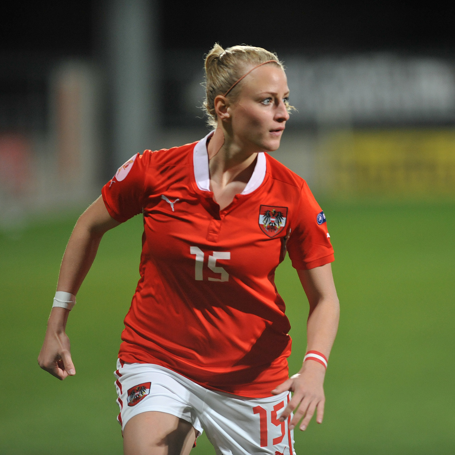 FIFA Women's World Cup 2015 Qualiying Round Österreich - Frankreich am 31. Oktober 2013 in Ritzing: Virgina Kirchberger